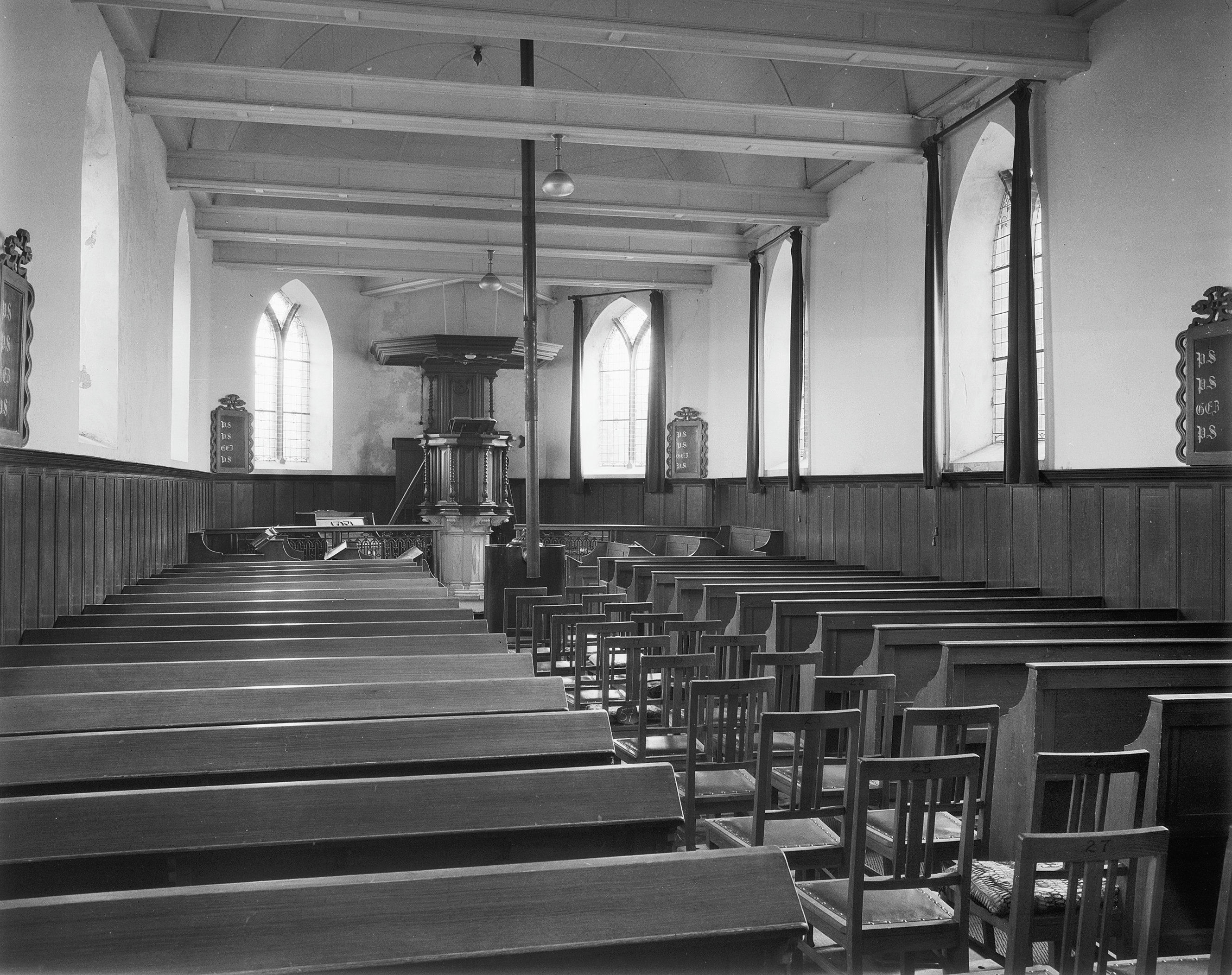 Abbega, Wartenterp - Gertrudiskerk: Interieur naar het oosten